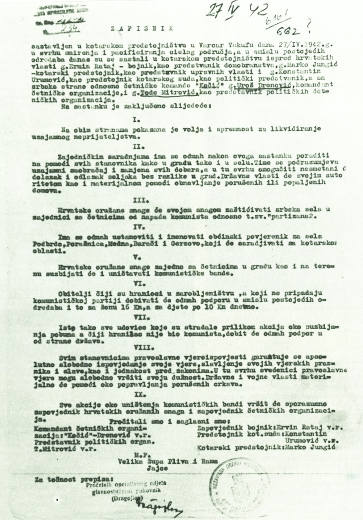 Srpskohrvatski / српскохрватски: Overeni prepis ugovora o lojalnosti i saradnji između vlasti NDH i četničkog vojvode Uroša Drenovića, od 27. aprila 1942. godine.[1][2] (Dokument se nalazi u Vojno-istorijskom arhivu u Beogradu, Arhiv VII, Ča, k. 234, reg. br. 3/2)